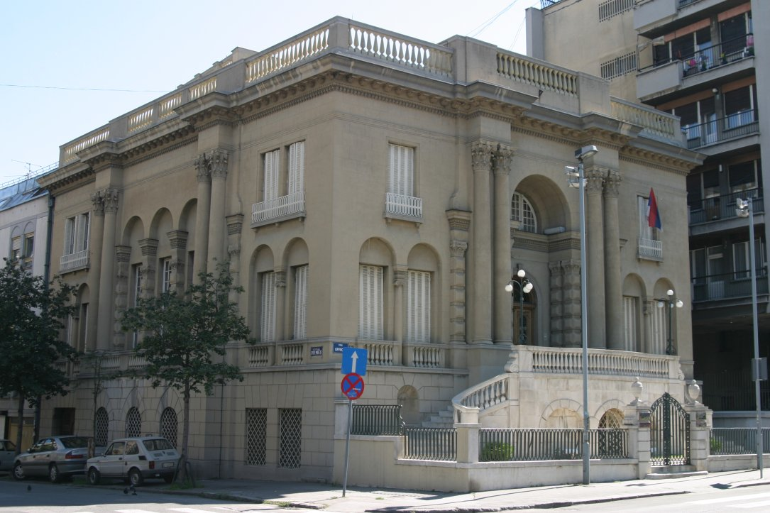 Nikola Tesla Museum (Muzej Nikole Tesle) in Belgrad im Sommer 2005